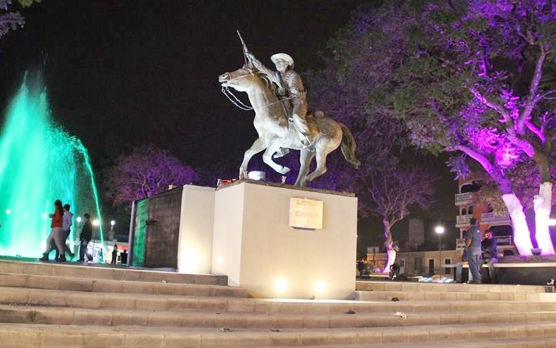 Nuevo parque del municipio y monumento al General Domingo Arenas